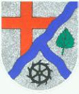 Wappen von Birkheim